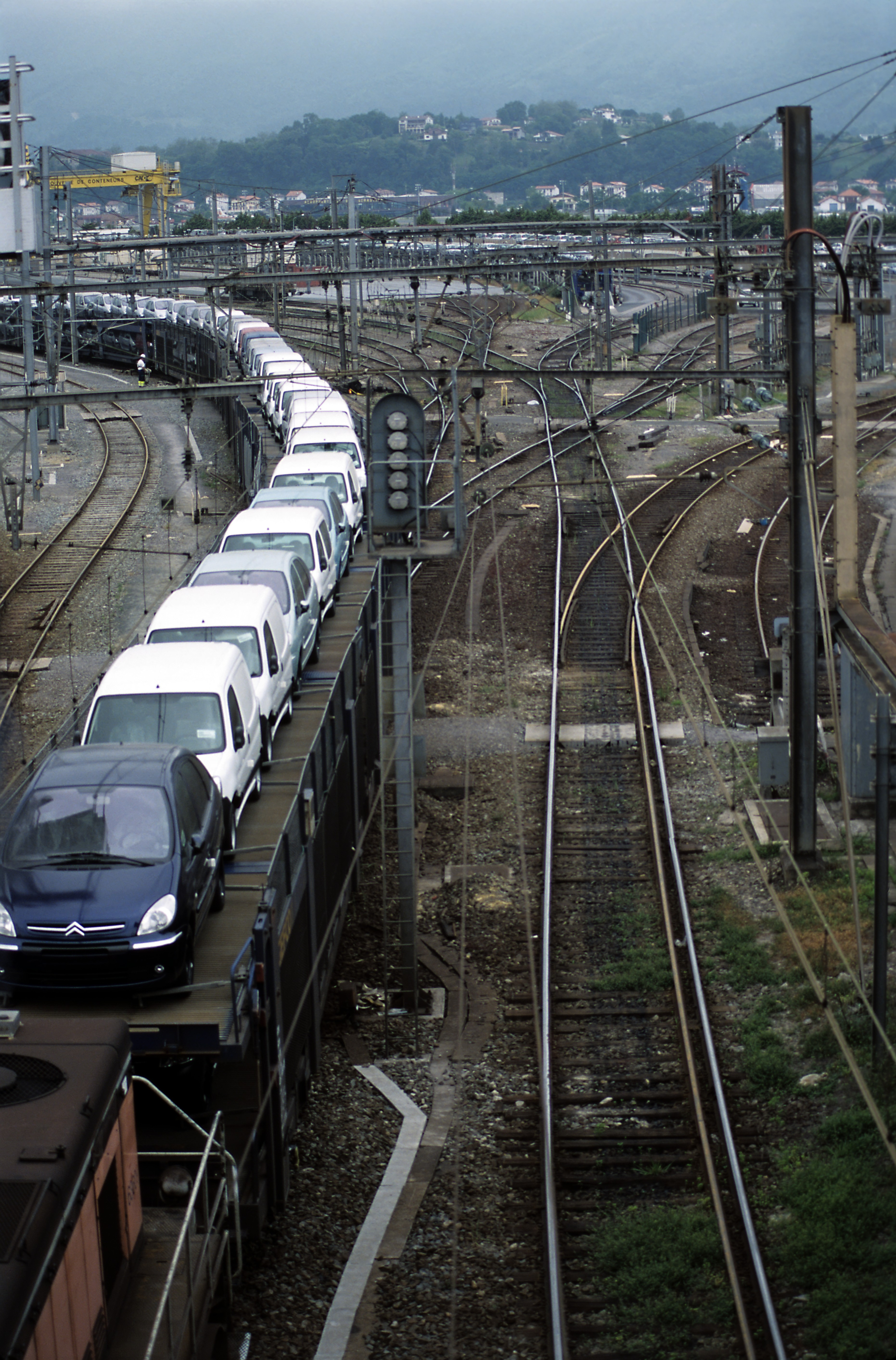 Aus Richtung Biarritz von der Straßenbrücke. Nach links geht es zum Personenbahnhof und zur Spurwechselanlage, im Hintergrund liegen die Umladeeinrichtungen. Das Dreischienengleis im Vordergrund ist ein Ausziehgleis.